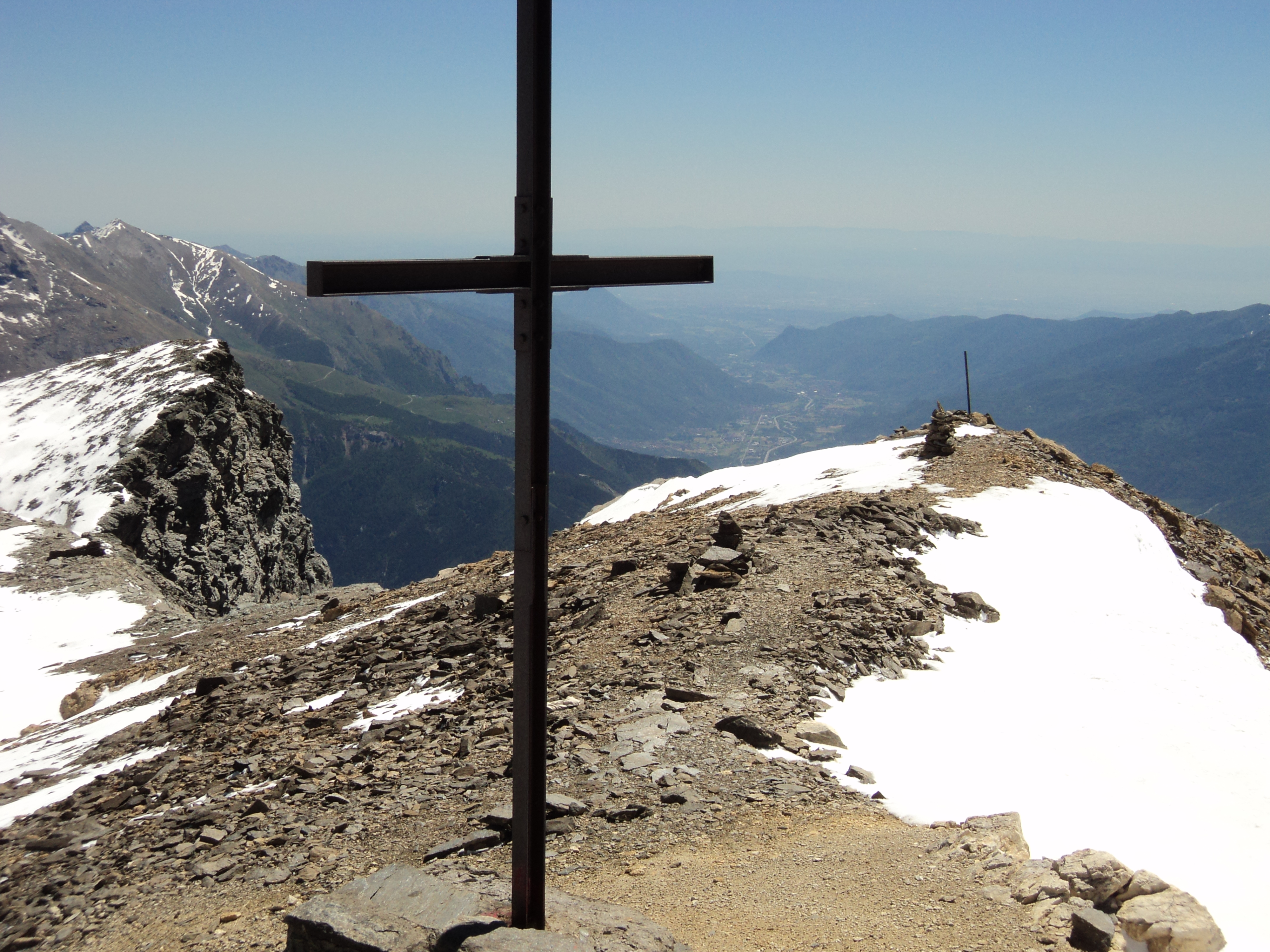 Vetta del Monte Giusalet e visione della Val di Susa.